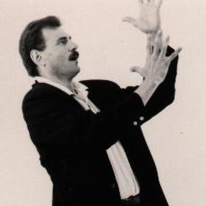 Jean-François Mercurio en signant